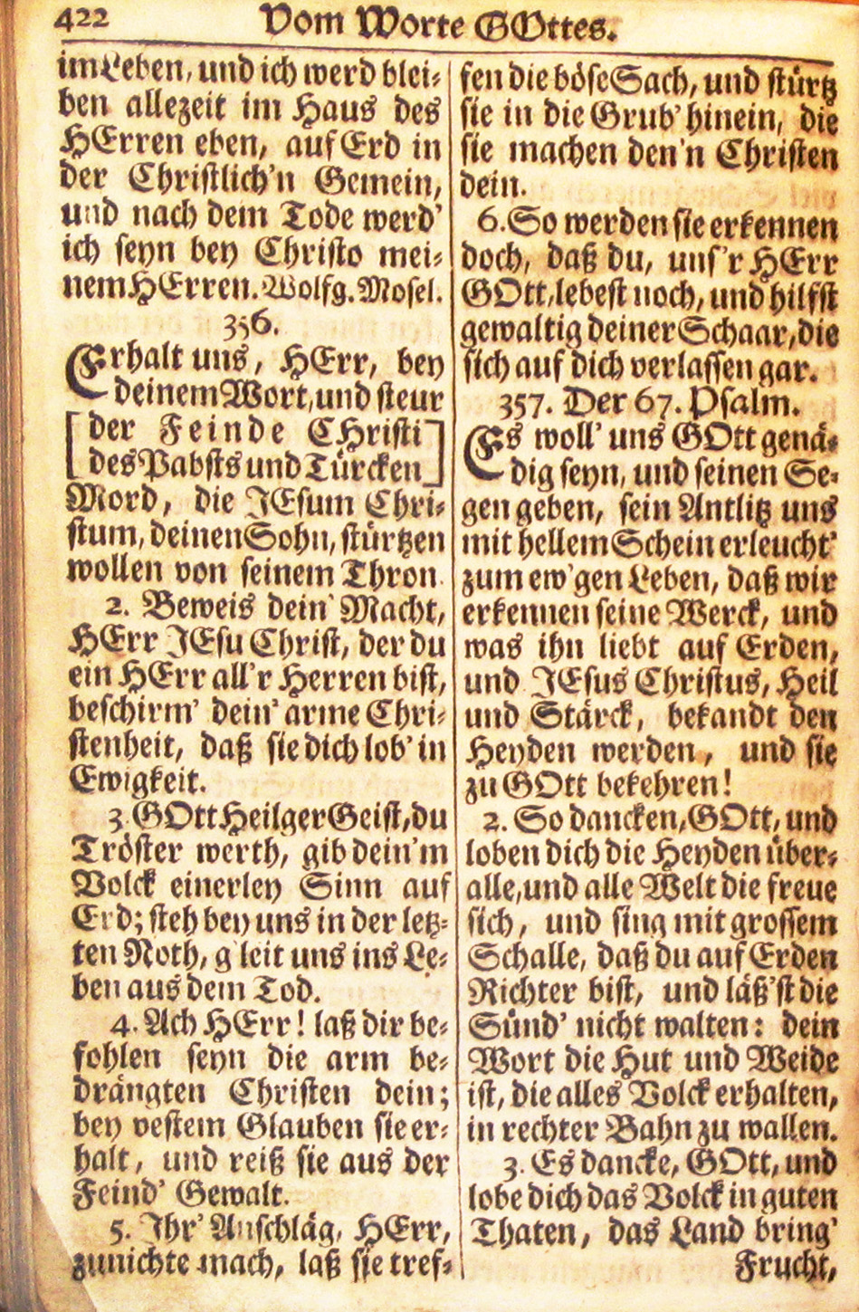 Erhalt uns Herr bei deinem Wort. Martin Luther, Magdeburger Gesangbuch